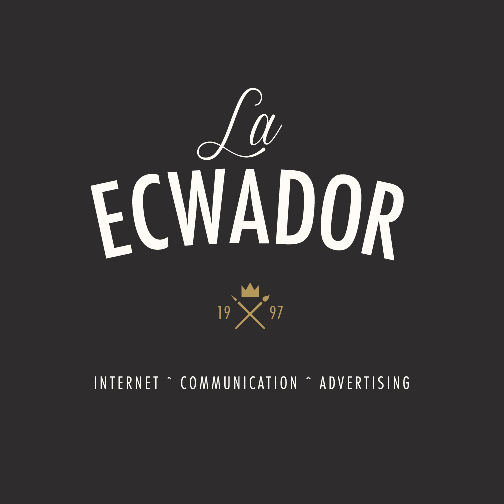 Agentuuri La Ecwador ametlik logo alates 2013. aasta 17. oktoobrist.